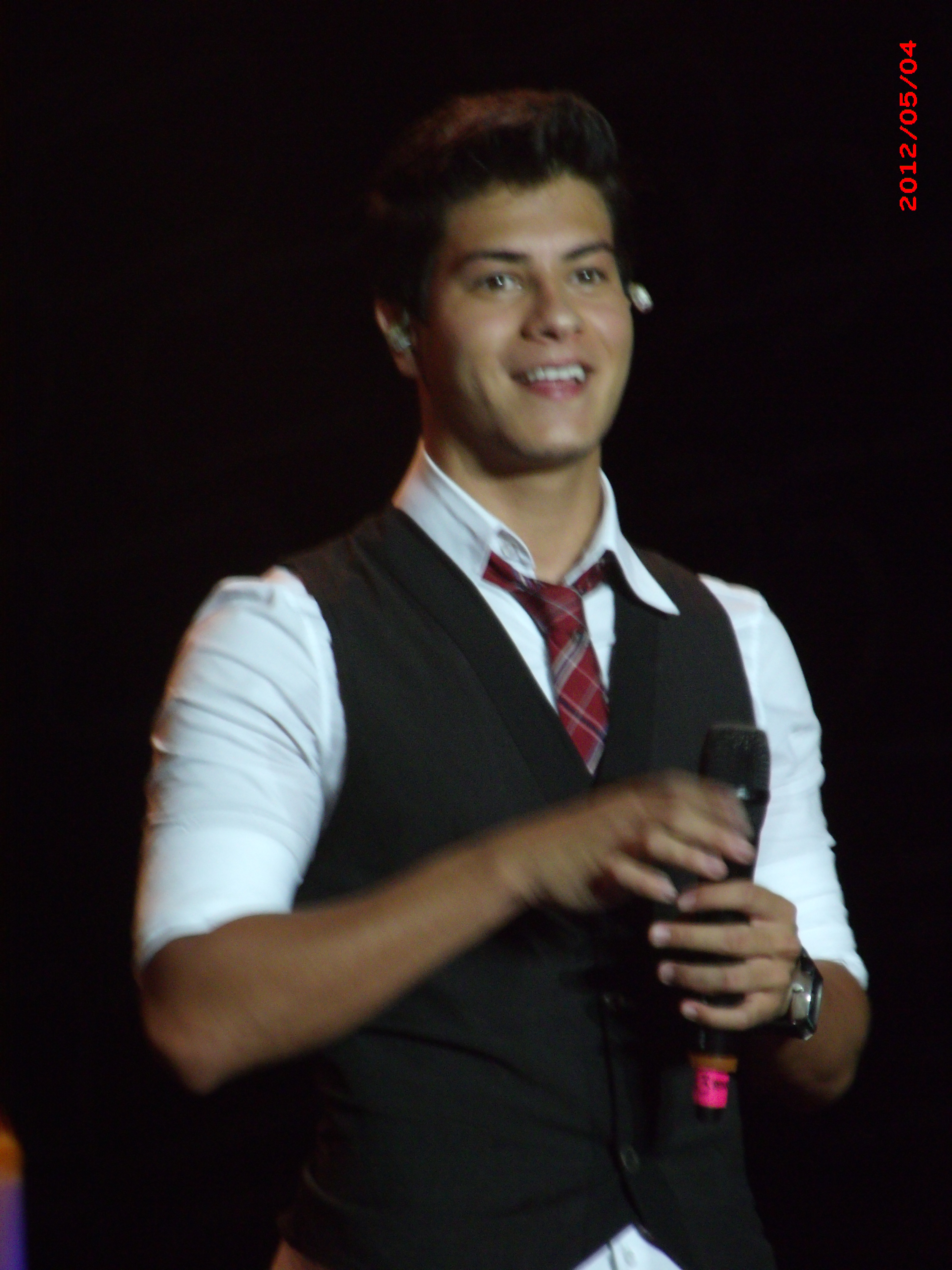 Arthur no show em Porto Alegre.